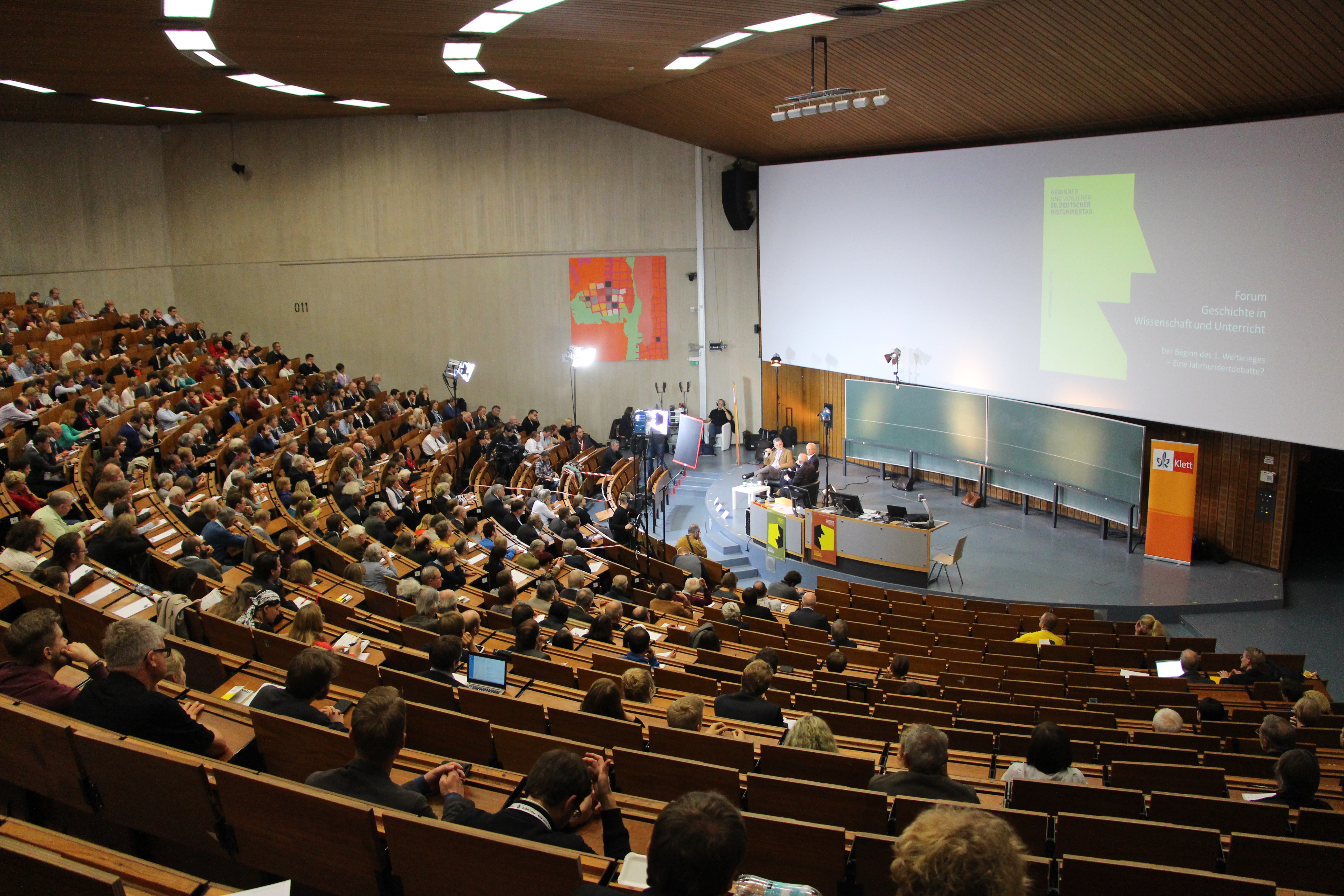 Historikertag 2014 in Göttingen.